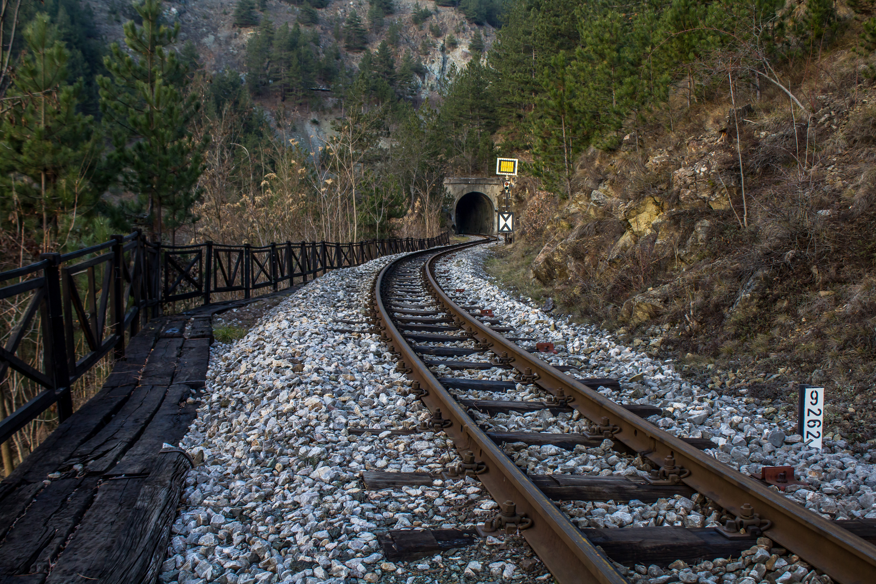 Ово је фотографија заштићеног природног добра у Србији под шифром: ПП14 This is a a photo of a natural area in Serbia with ID: ПП14 Парк природе Шарган — Мокра Гора